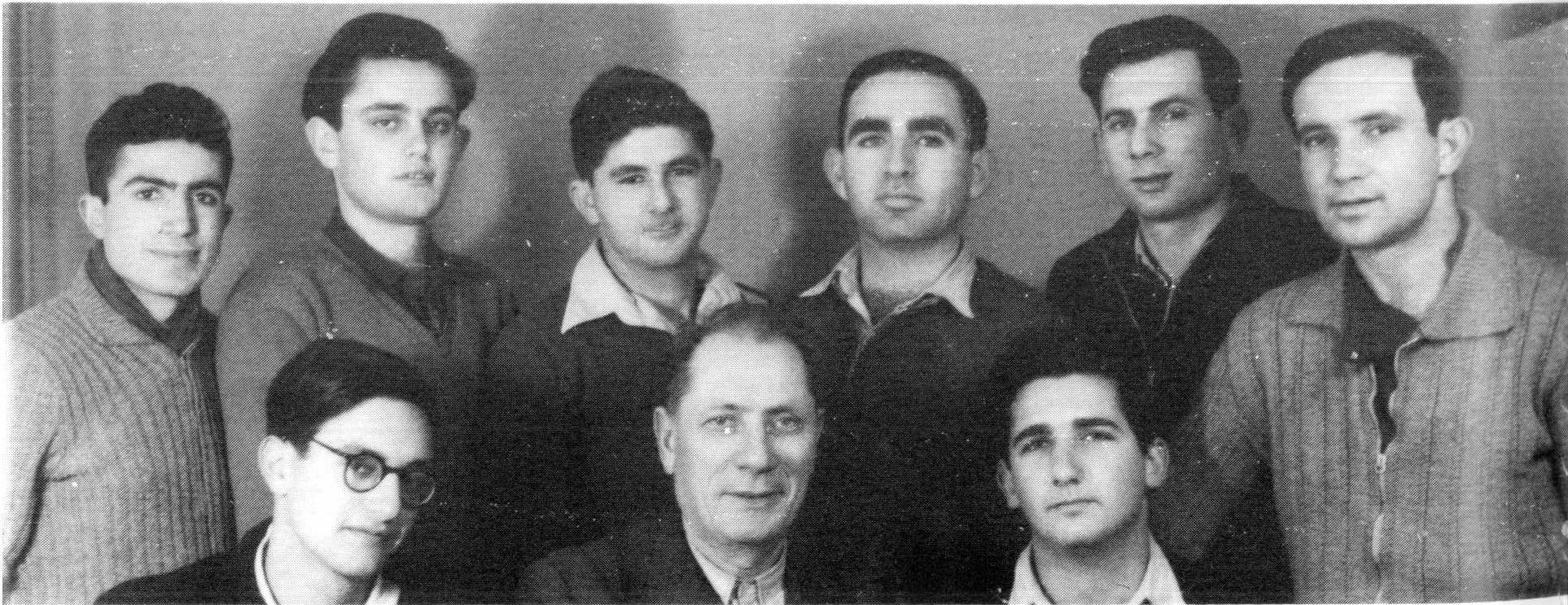 דוד כהן והחברי מזכירות הנוער העובד 1949. דוד באמצע למטה.